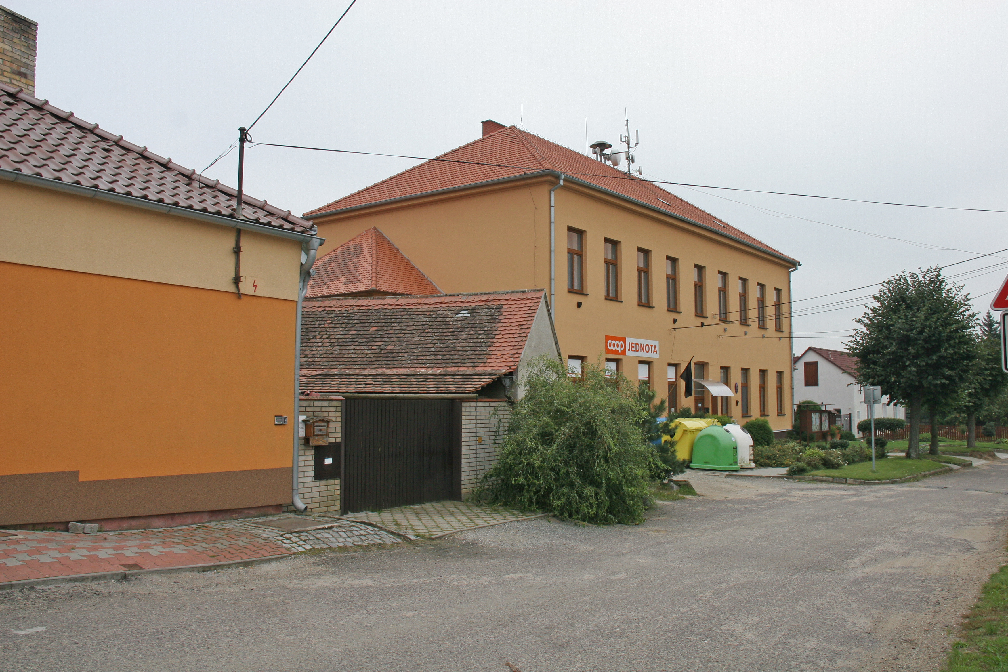 Vranovská Ves obecní úřad